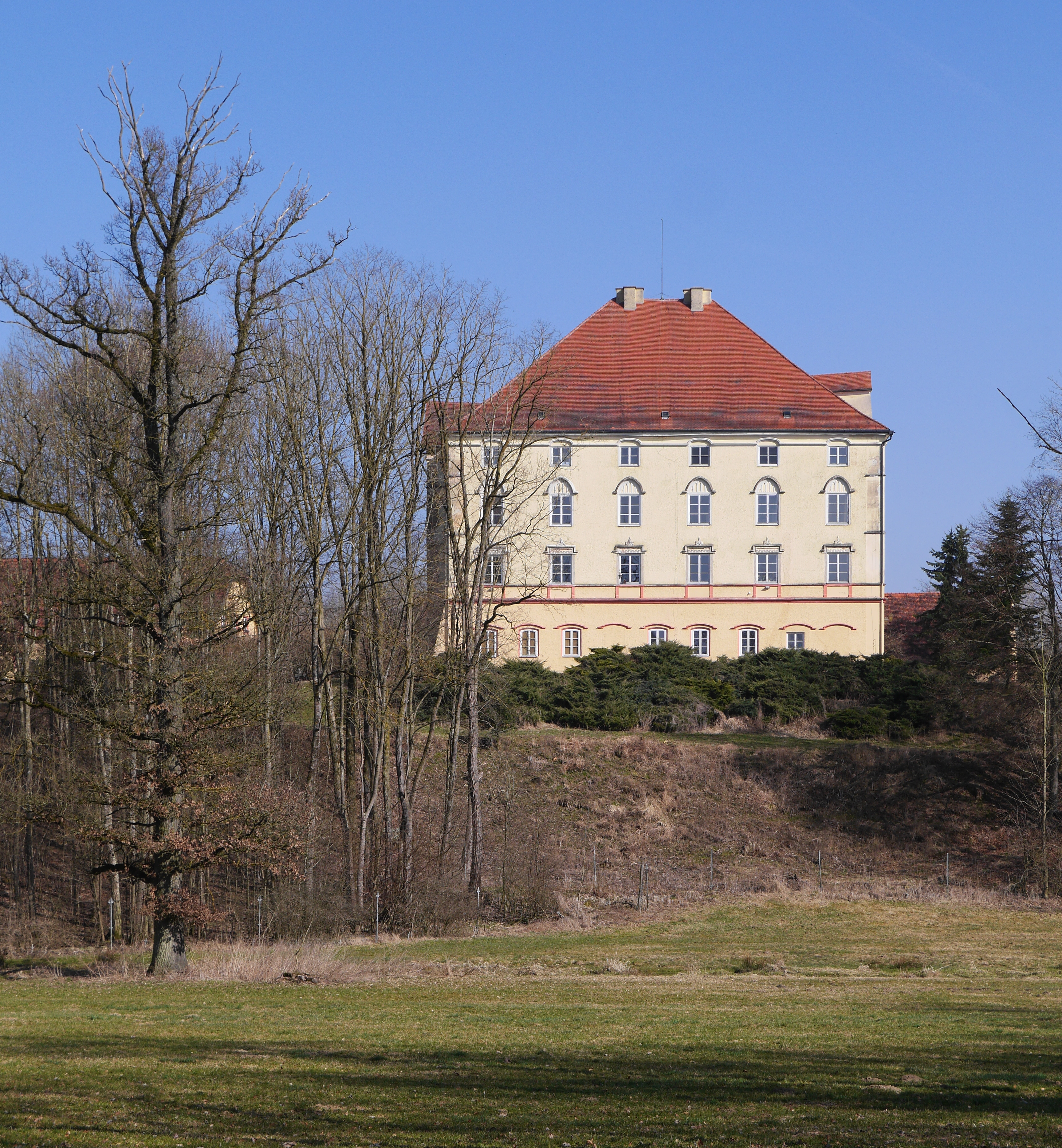 Schloss Egglkofen aus Richtung Osten This is a photograph of an architectural monument.